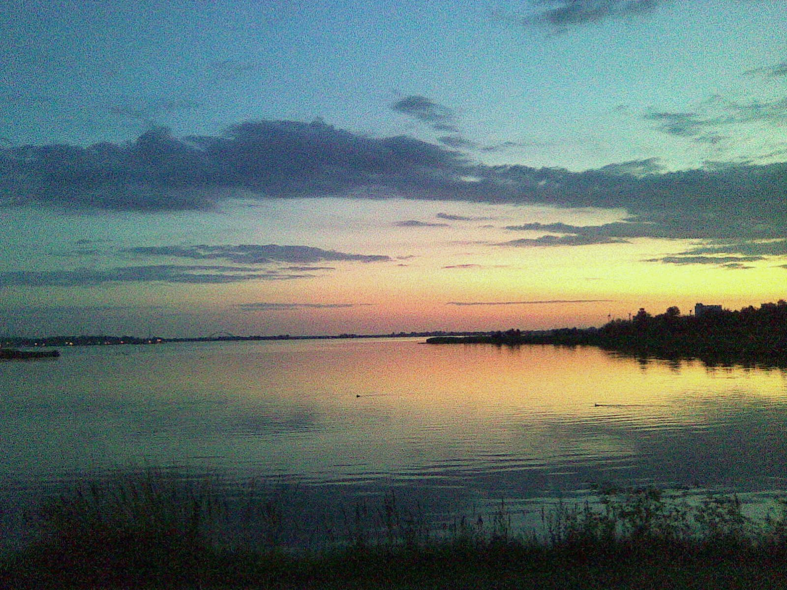 Der Burger Binnensee bei Nacht, zwischen Neue Tiefe und Burgtiefe.